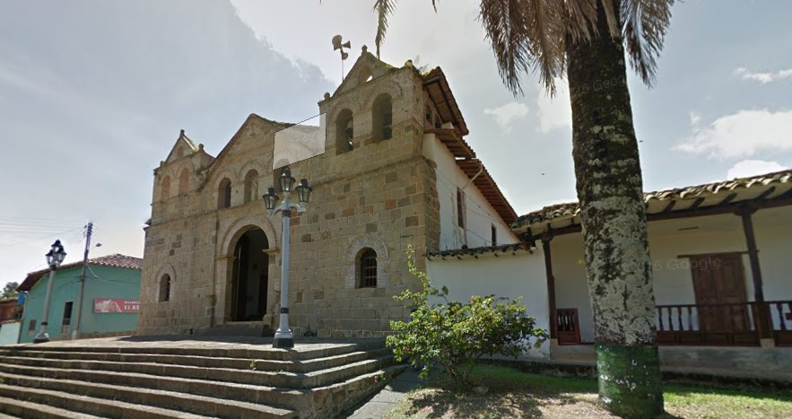 Templo la Inmaculada concepción Palmas del socorro, Santander